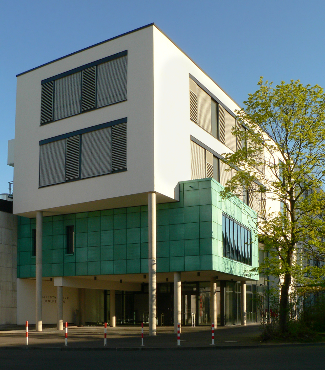 Ratsgymnasium Wolfsburg Neubau